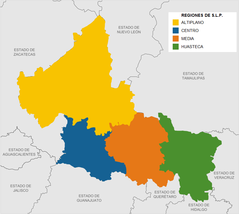 Las cuatro regiones del estado de San Luis Potosí, Altiplano, Centro, Media y Huasteca